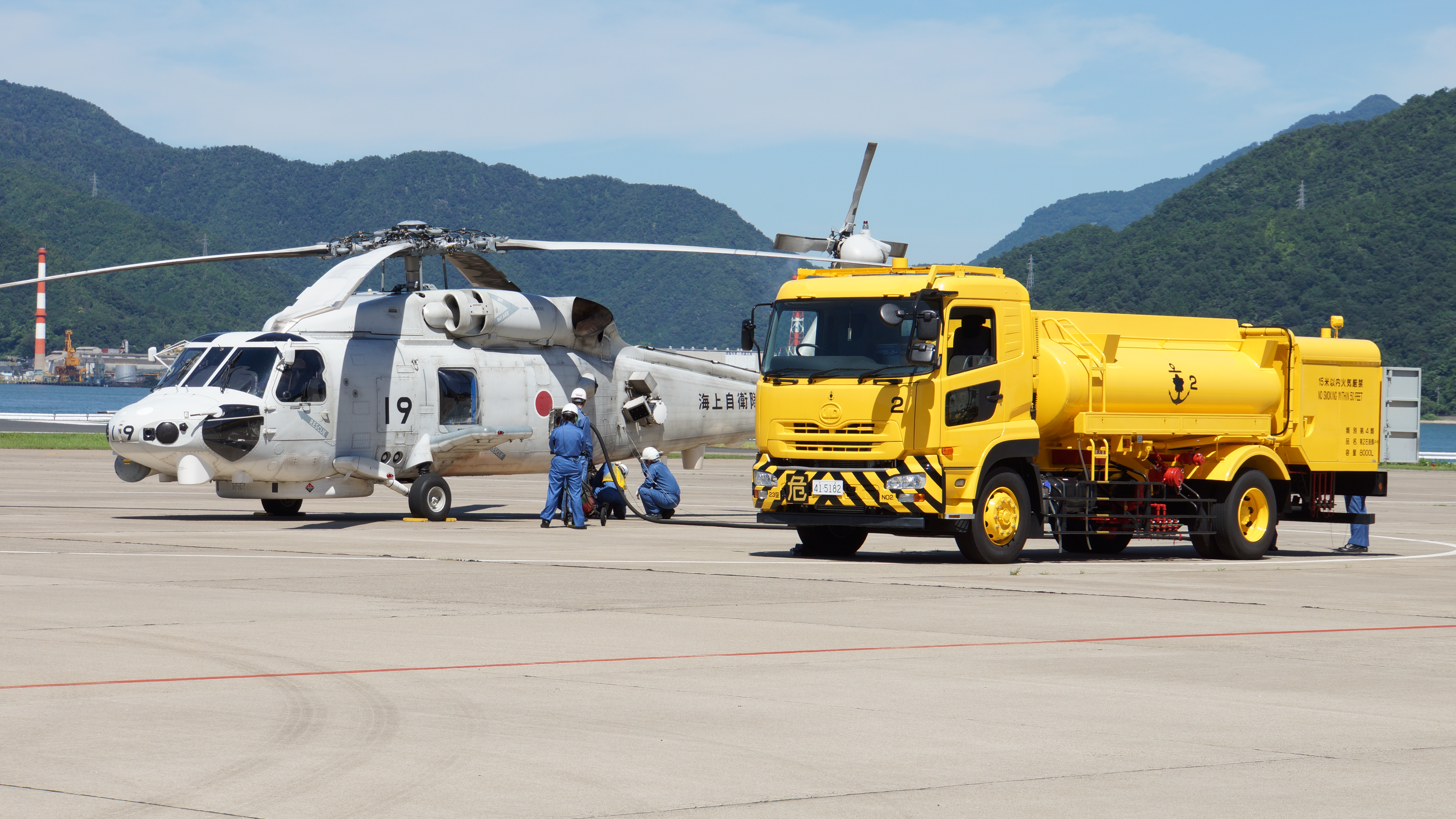 海上自衛隊 SH-60K哨戒ヘリコプター（8419号機）に給油する8000l燃料給油車（UDトラックス・コンドル）。 15年7月26日 舞鶴航空基地にて。